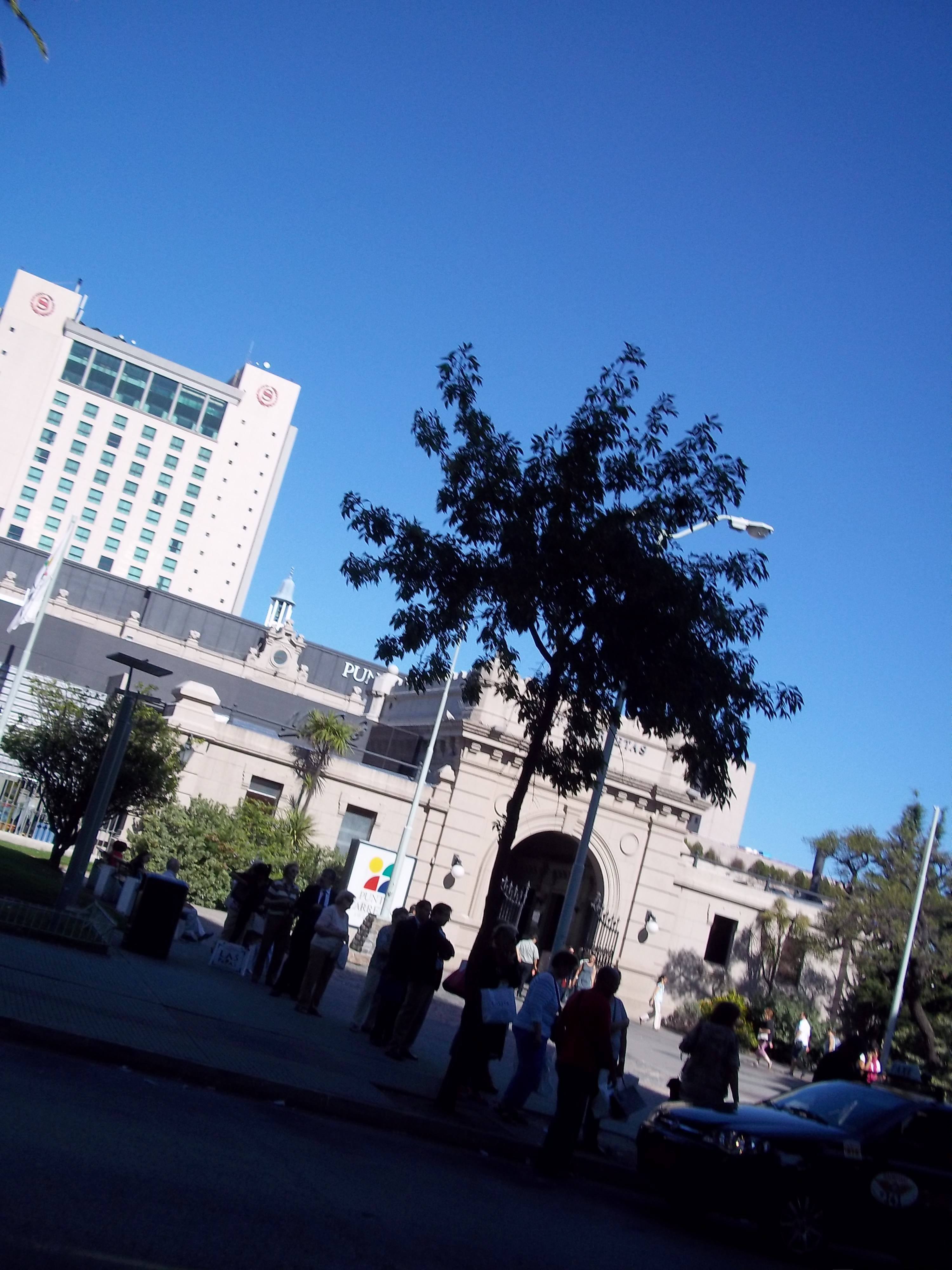 Entrada principal del Punta Carretas Shopping, Montevideo, Uruguay.